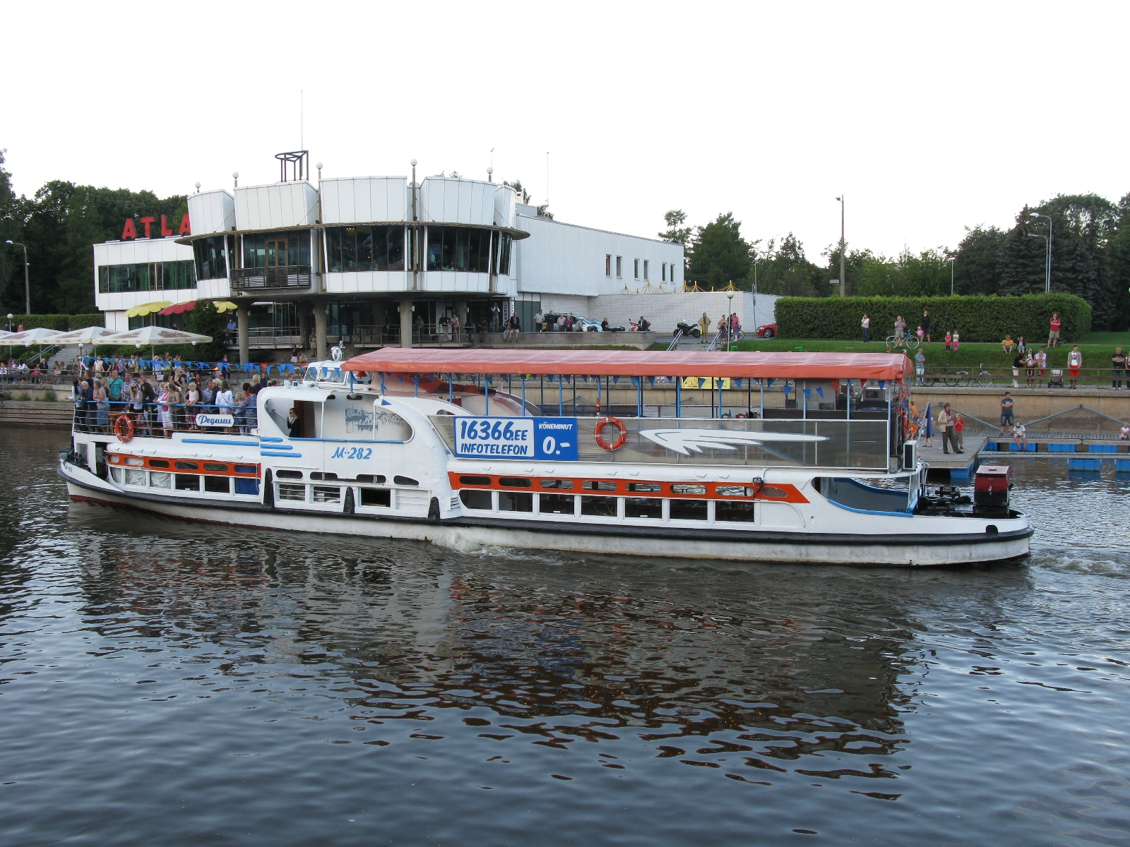 Mootorlaev Pegasus (end. M-282) Emajõe festivalil klubi Atlantis ees, 18. august 2012